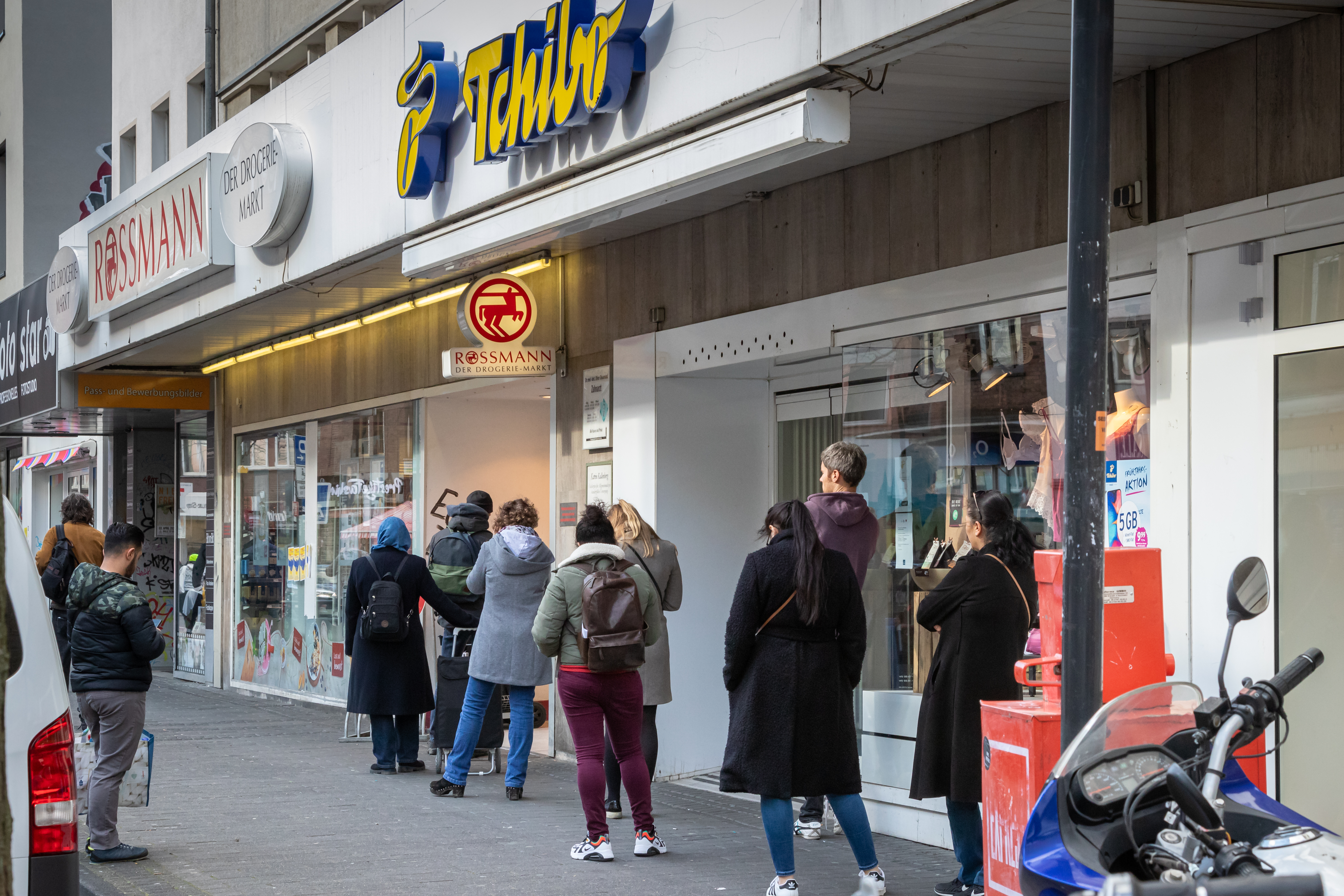 Social-Distancing-Schlange vor der Rossmann-Filiale Köln-Venloer Straße aufgrund der Covid-19-Pandemie